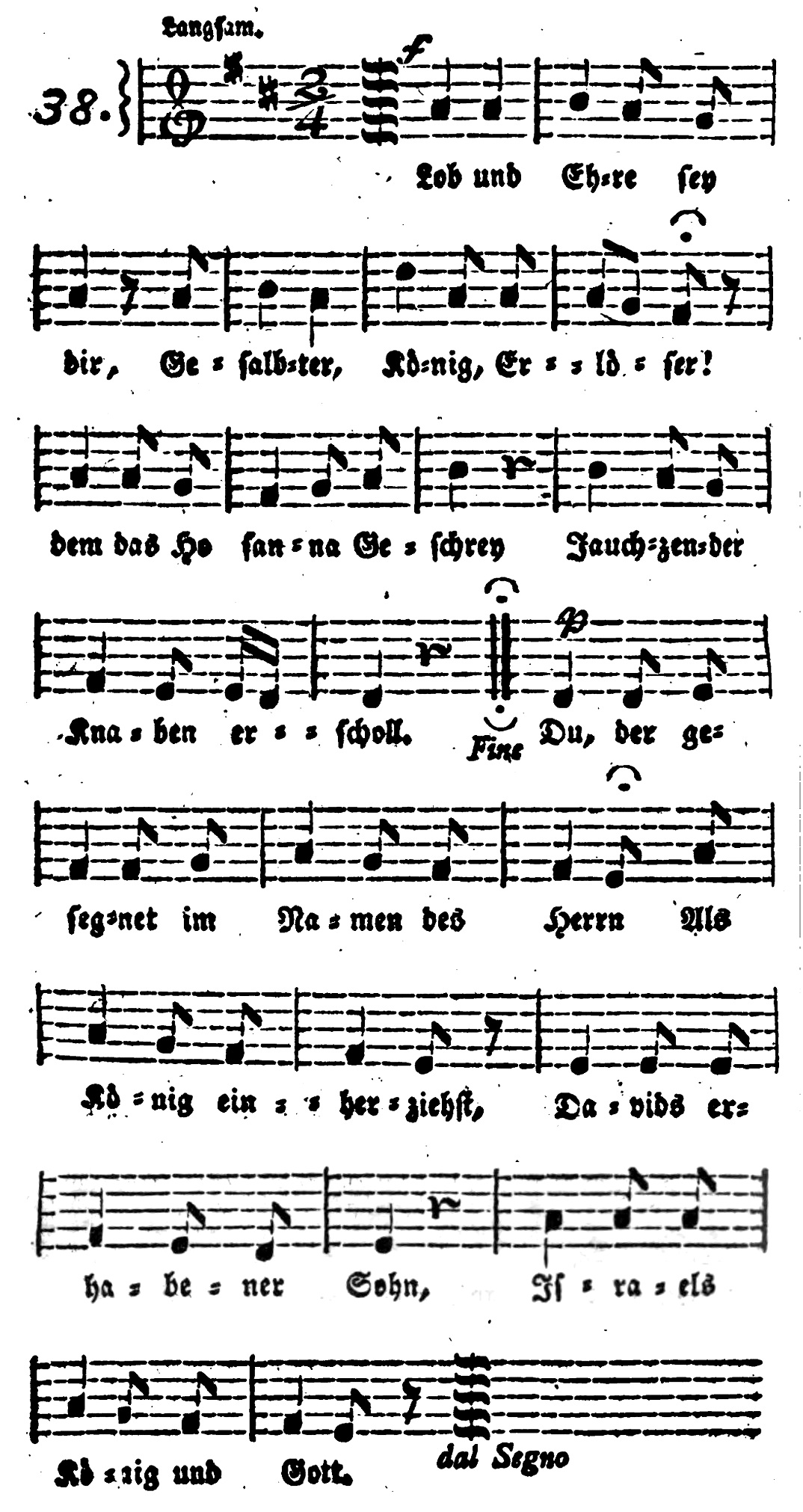 Lob und Ehre sei dir, Gesang zur Palmsonntagsprozession, im Verspoellschen Gesangbuch 1810